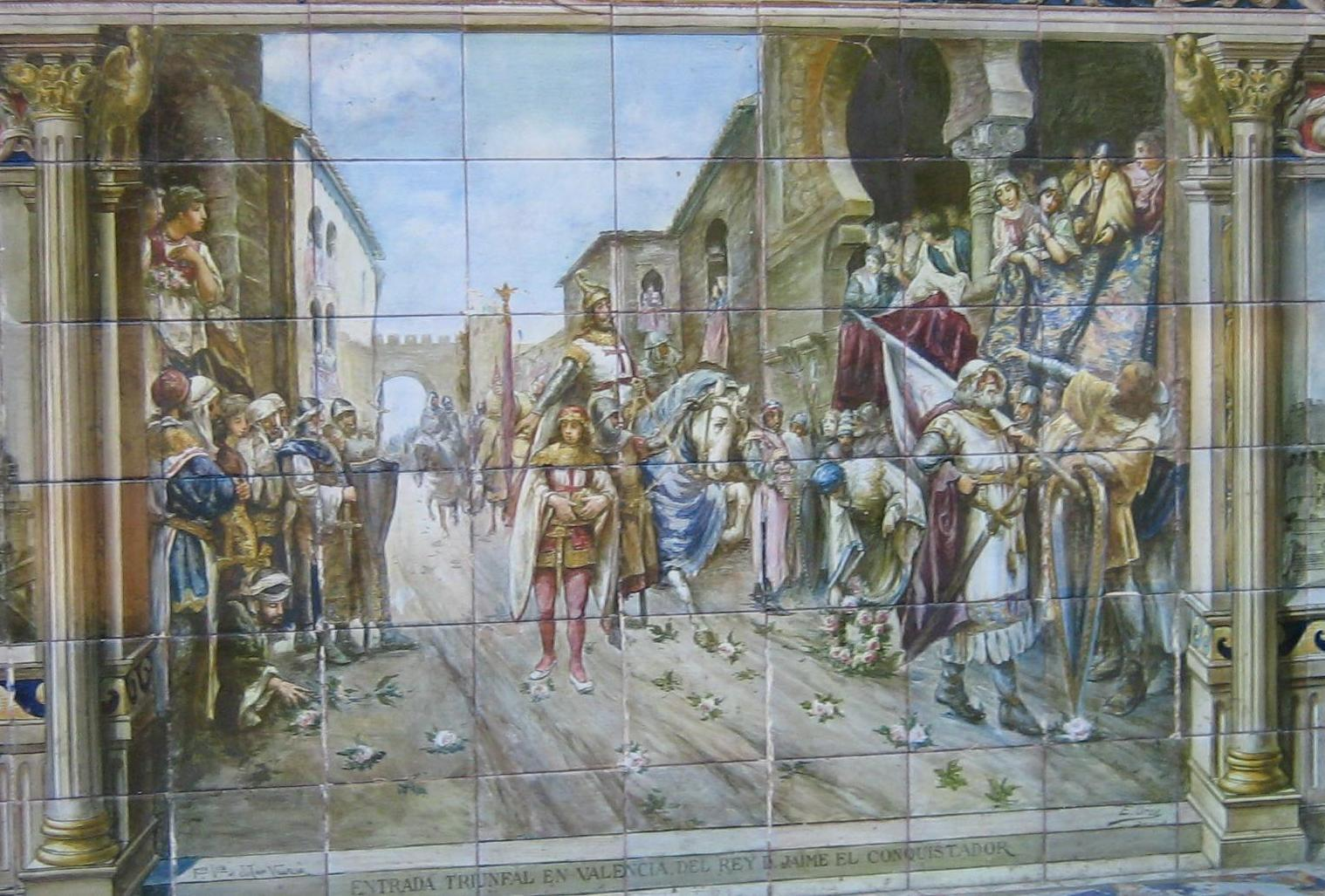 Entrada triunfal de Jaume I en Valencia